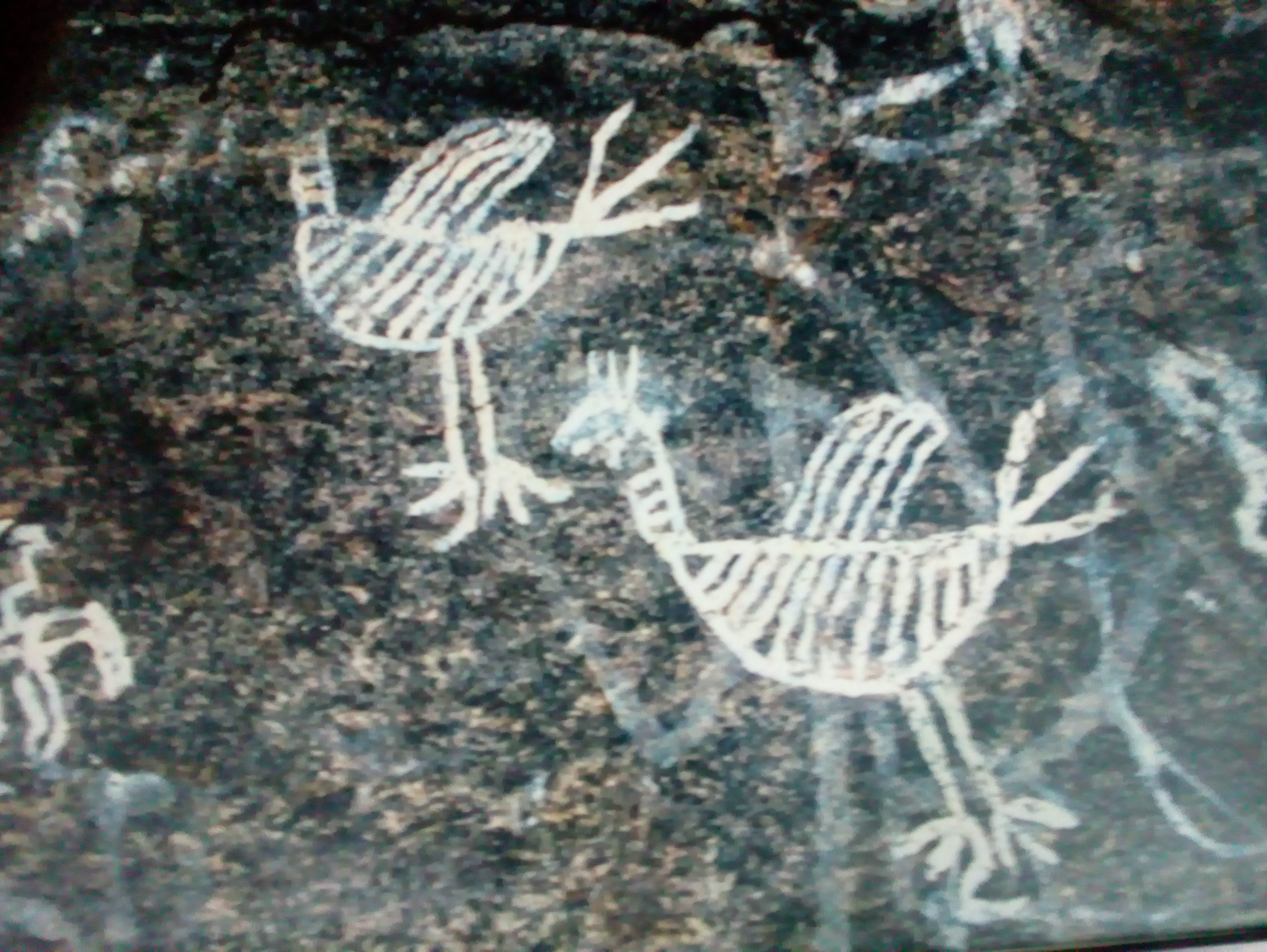 ஆதி கால மனிதனின் படைப்பாற்றல்